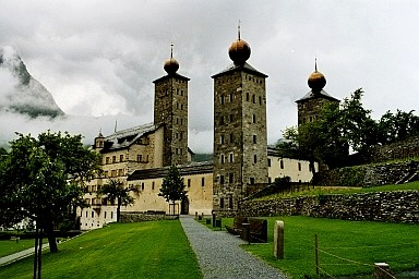 Stockalper Schloss in Brig (Schweiz)